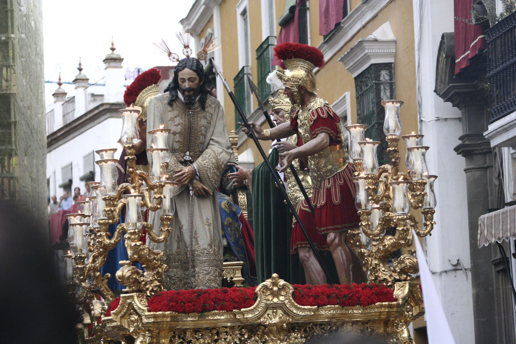 Nuestro Padre Jesús del Silencio en el desprecio de Herodes. Semana Santa en Sevilla. Año 2006 Foto realizada y propiedad de Ángel Chacón